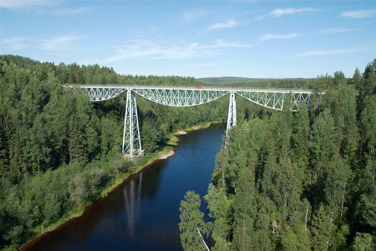 Första bron. Landsvägsbro. Byggdes 1891 och är en stålfackverksbro i fyra spann - alla olika långa - med hängande parabelfackverk och med en total spännvidd av 164 meter.; Bro; Byggnadsverk; Kommunikationsväsen